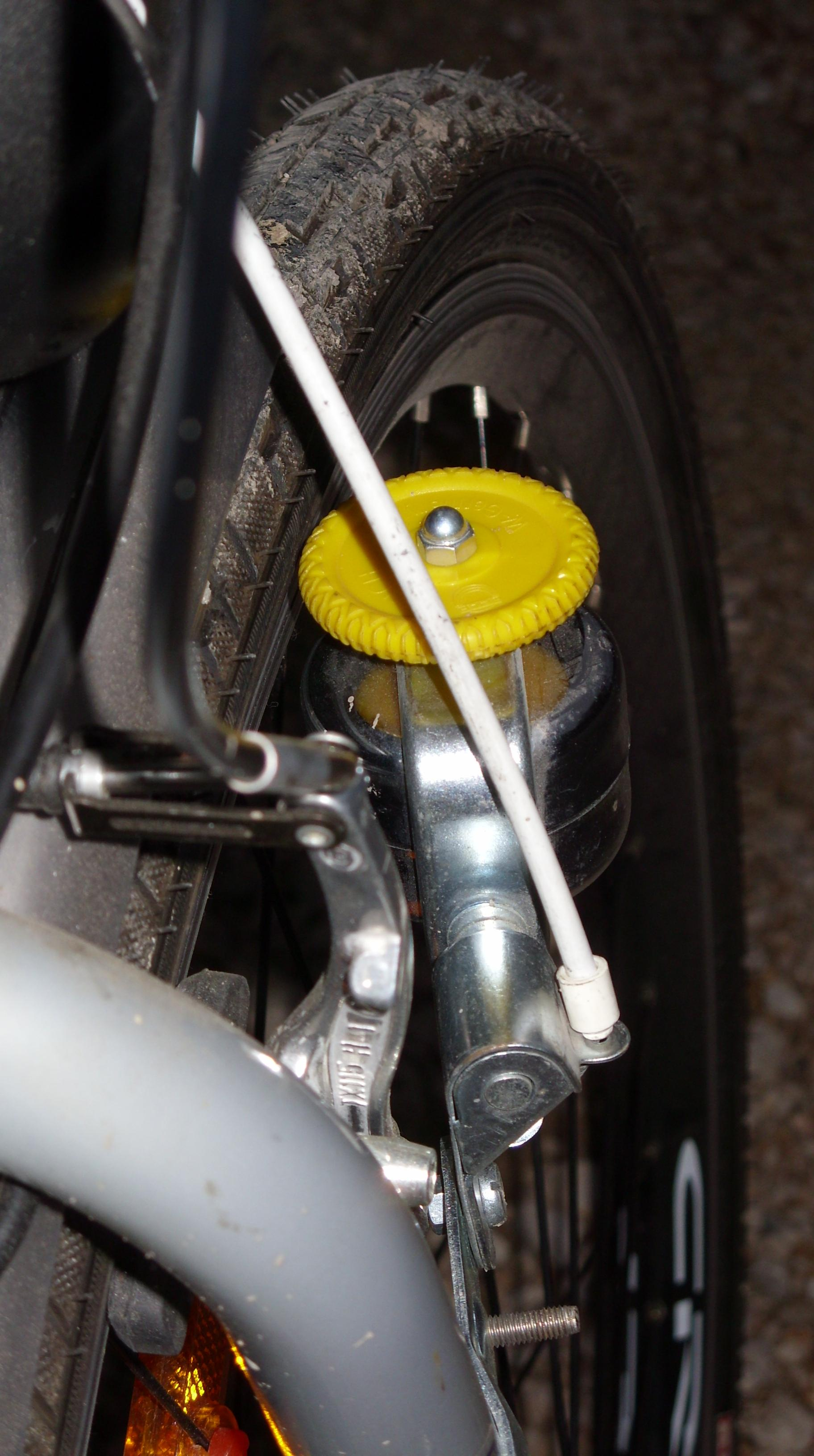 Vrtilni zvonec za kolo / Fahrrad-Sturmklingel / Revolving bicycle bell